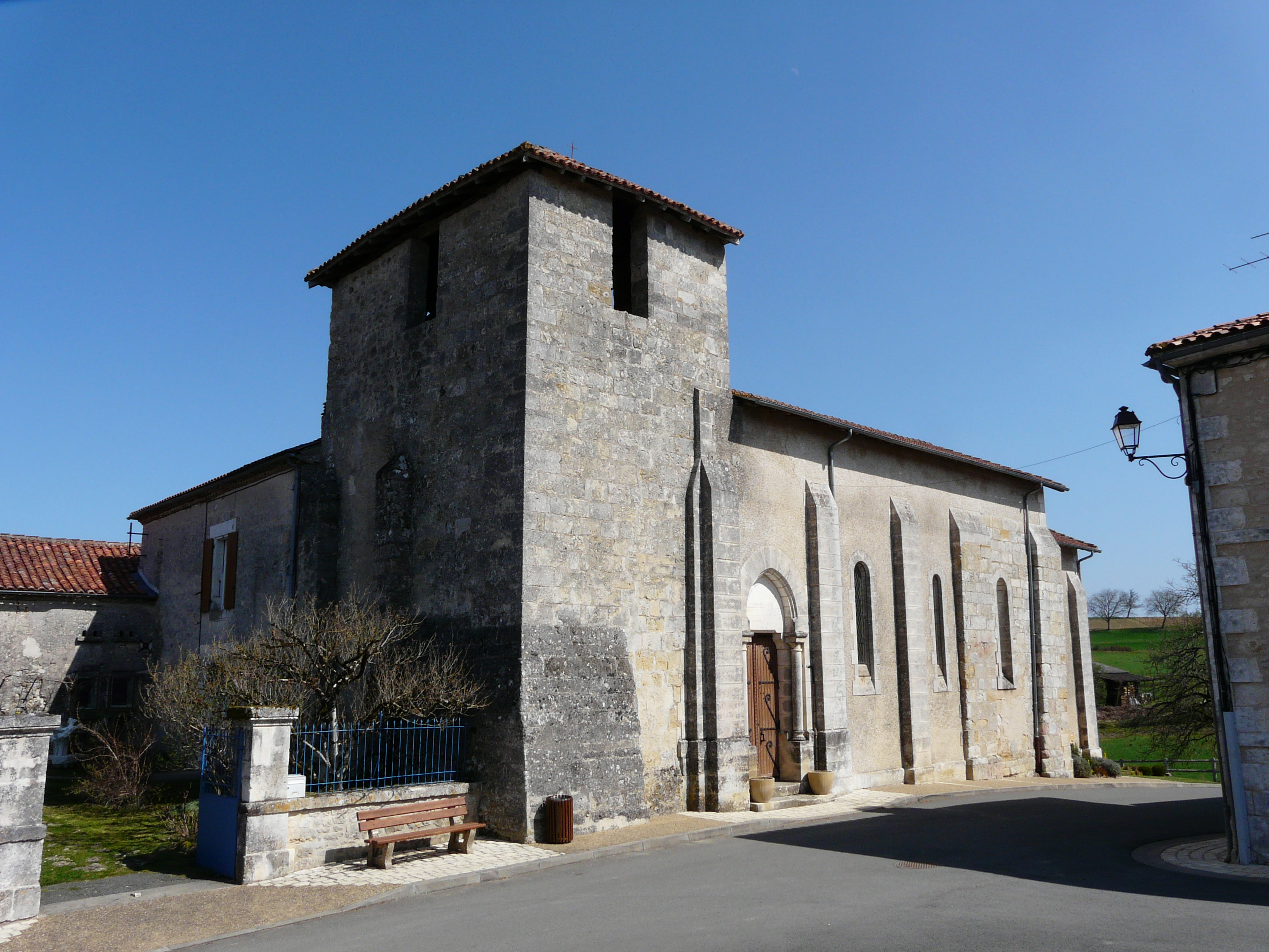 L'église Saint-Pancrace vue du sud-ouest, commune de Saint-Pancrace, Dordogne, France.